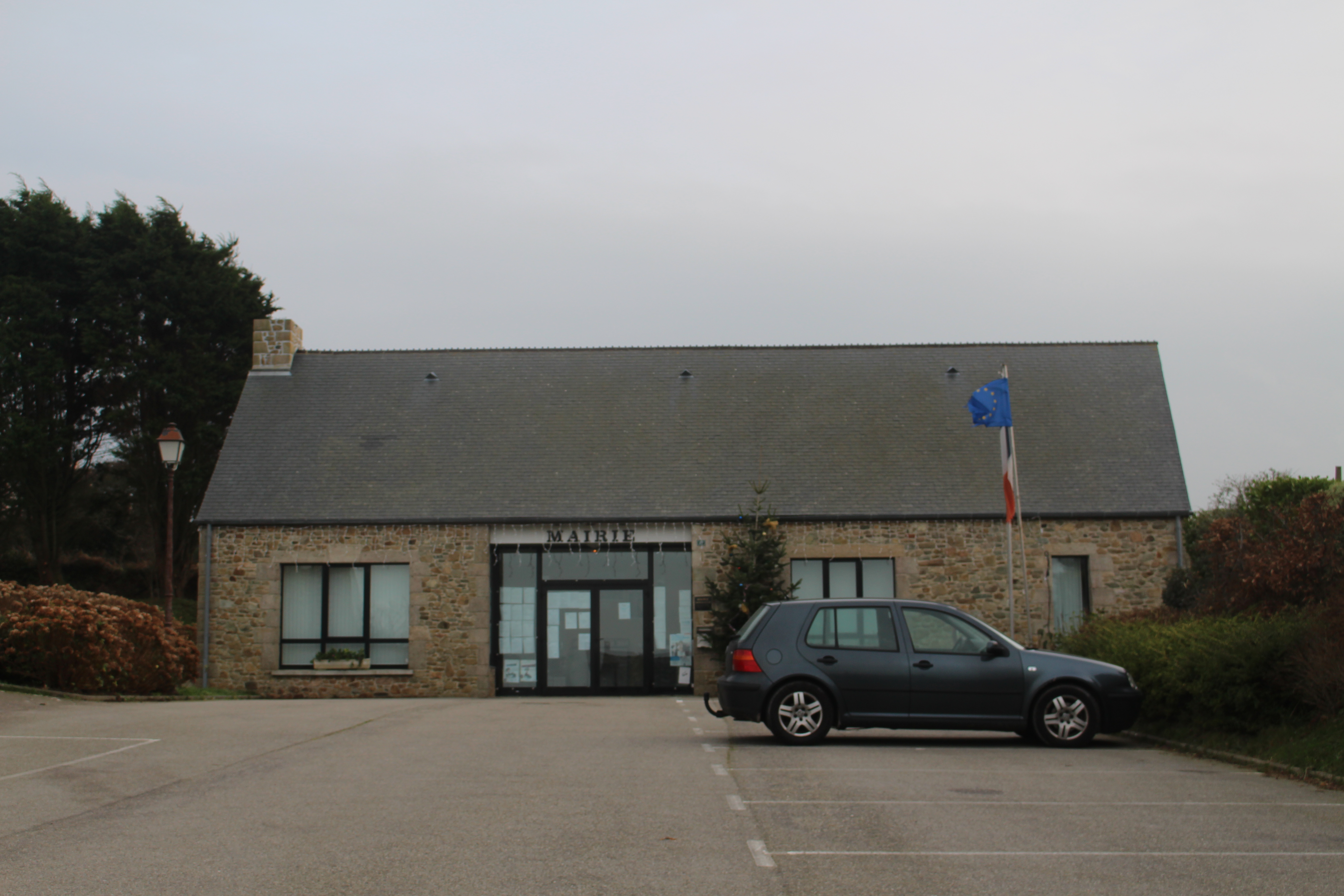 Saint-Germain-des-Vaux, Manche